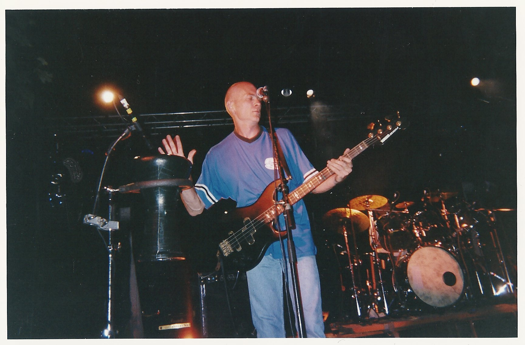 Marc Dechaumont à la basse et au derbouka (été 1998)